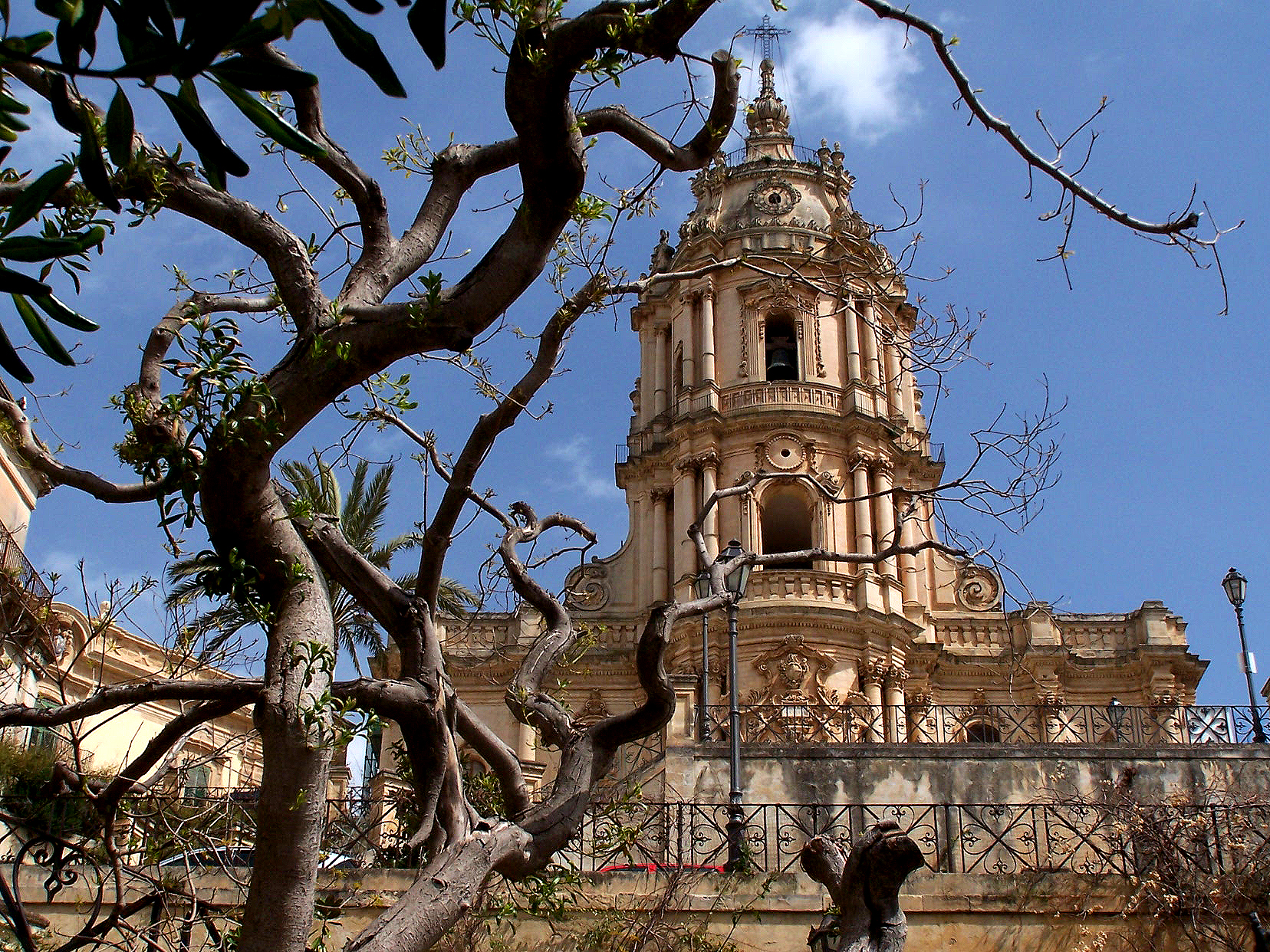 Chiesa di S. Giorgio a Modica vista dalla scalinata